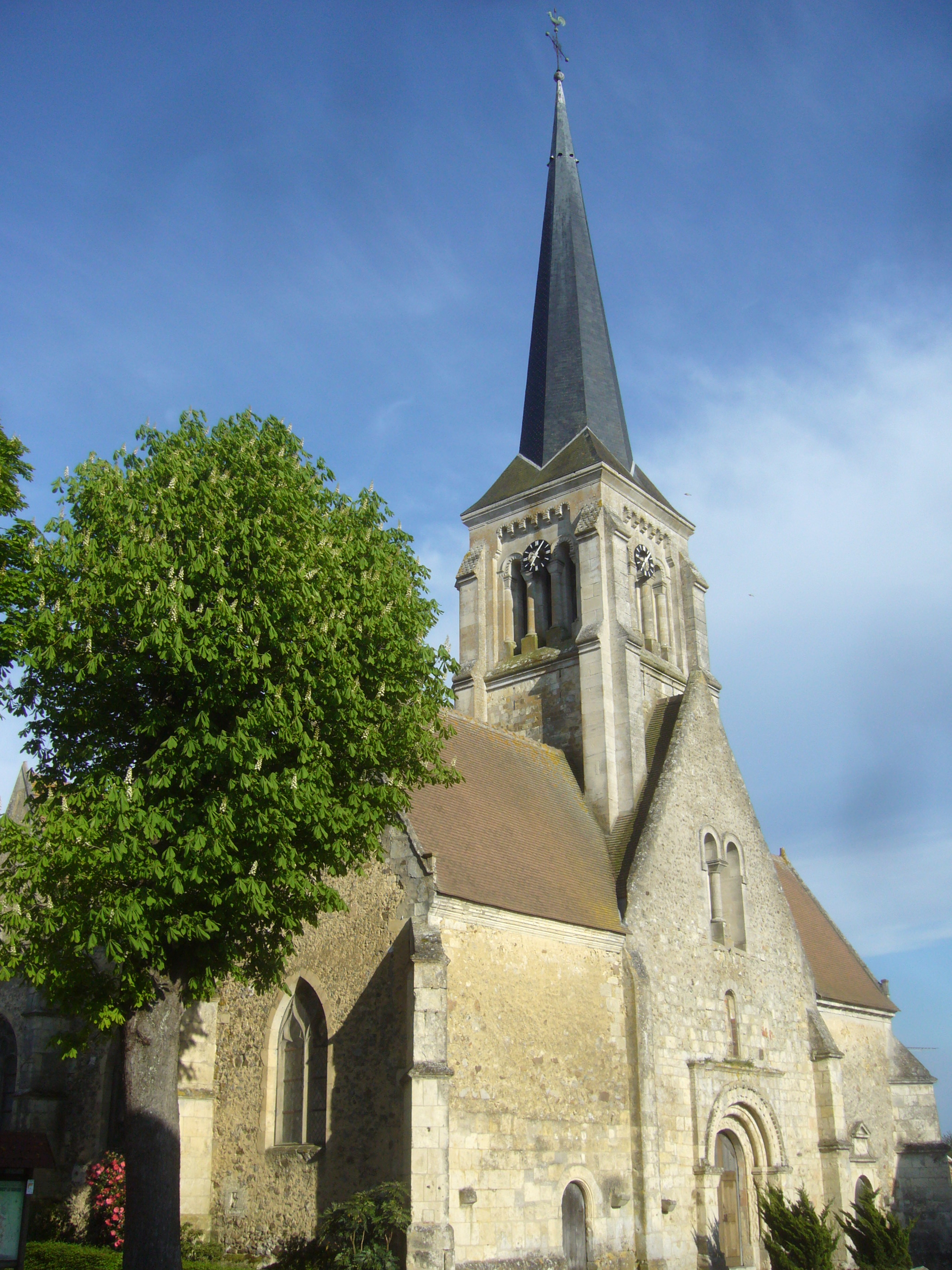 Église Saint-Jouin-de-Marnes de Nogent-le-Bernard, dans la Sarthe. .